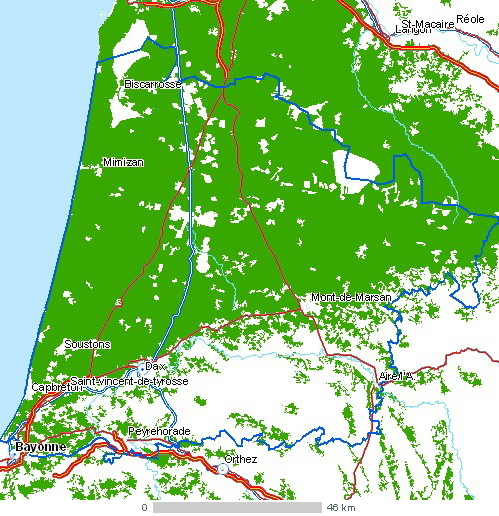 Carte du département Landes Légende